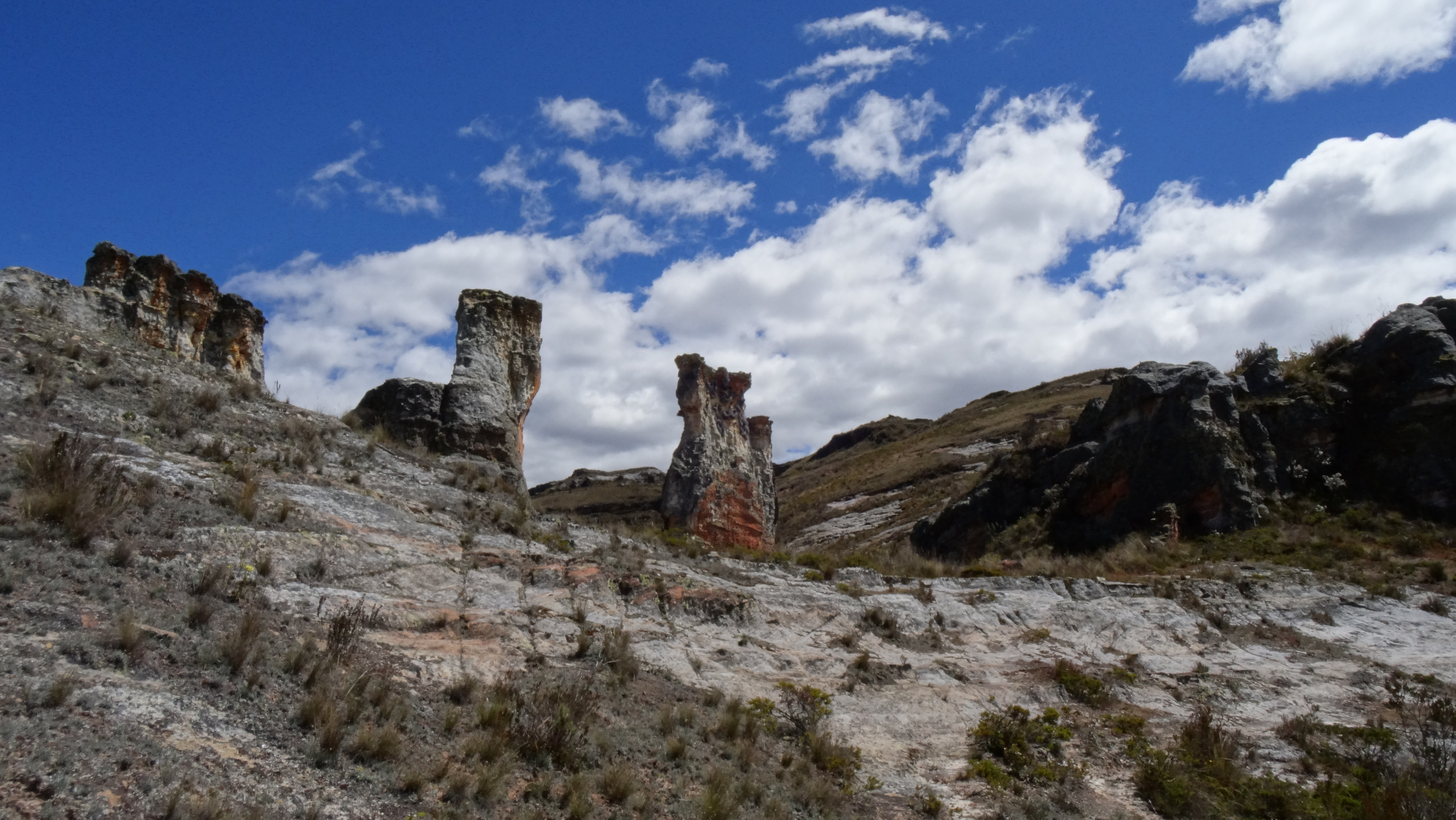 Formaciones pétreas en la montaña Ocpay.